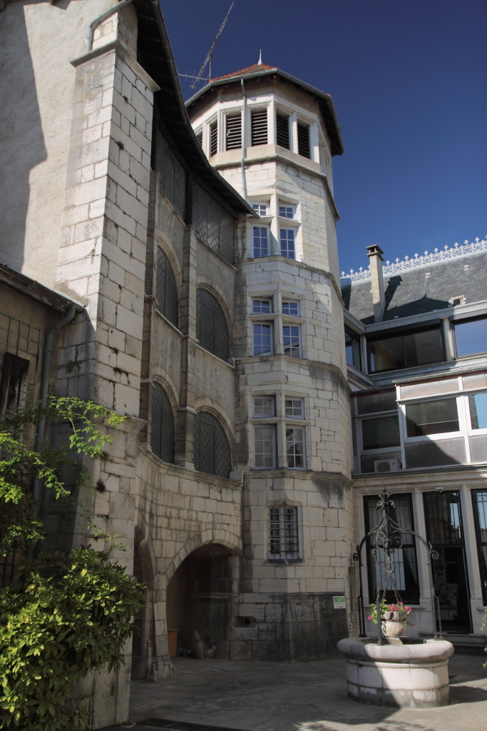 Puits, tour et galerie dans la cours intérieure de l'hôtel des Ducs de Savoie, à Belley (France)